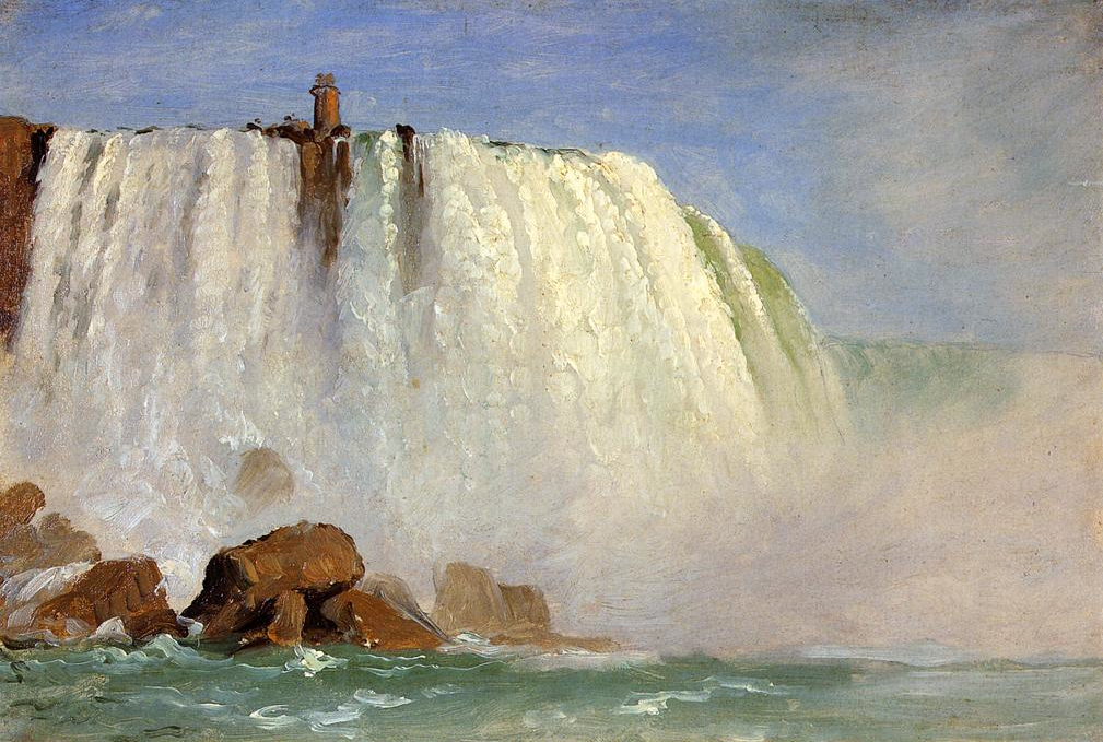 Study for "Under Niagara"